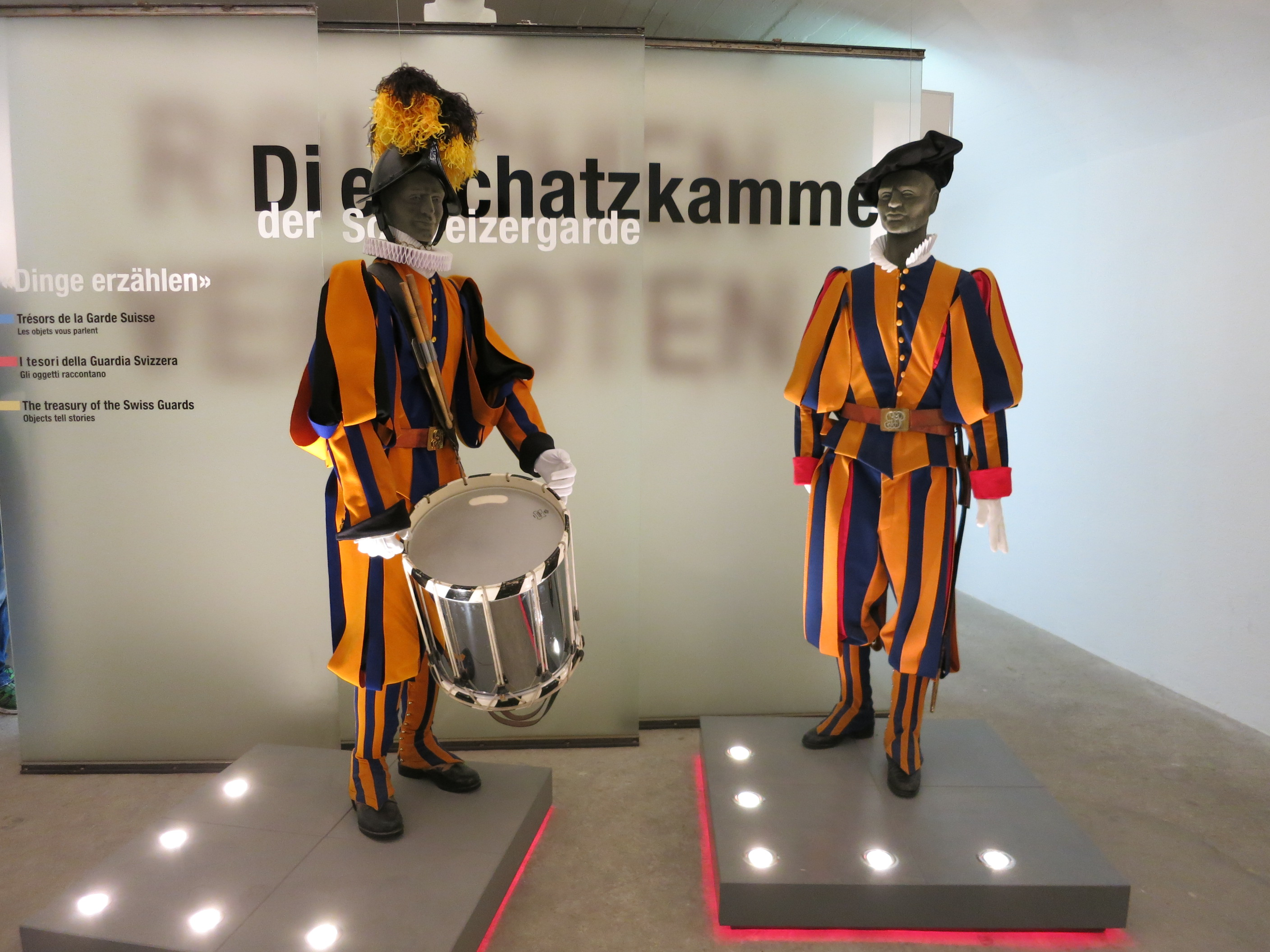 Artilleriewerk Naters VS, Schweiz